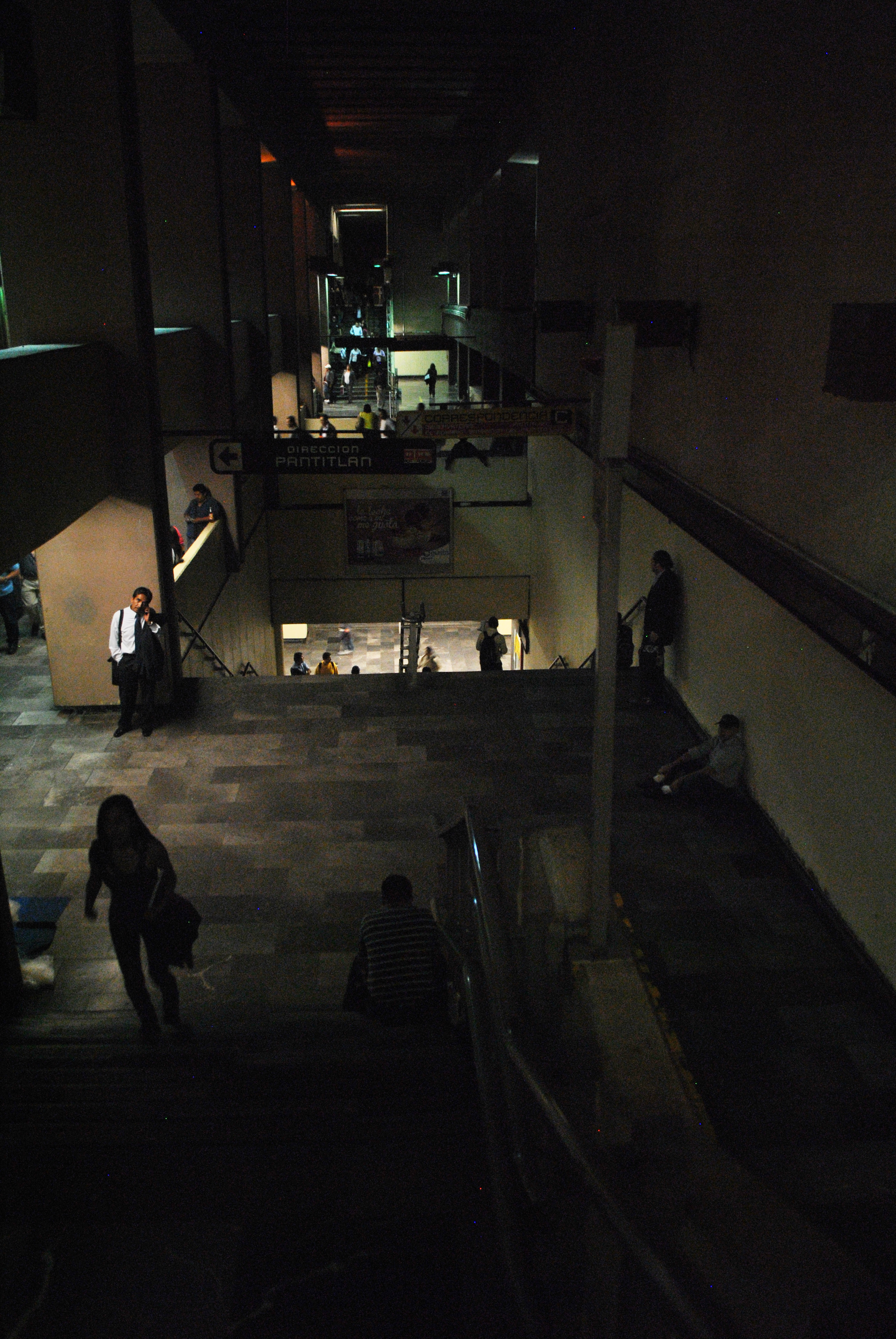 Estación Tacubaya del Metro de la Ciudad de México, línea 9.